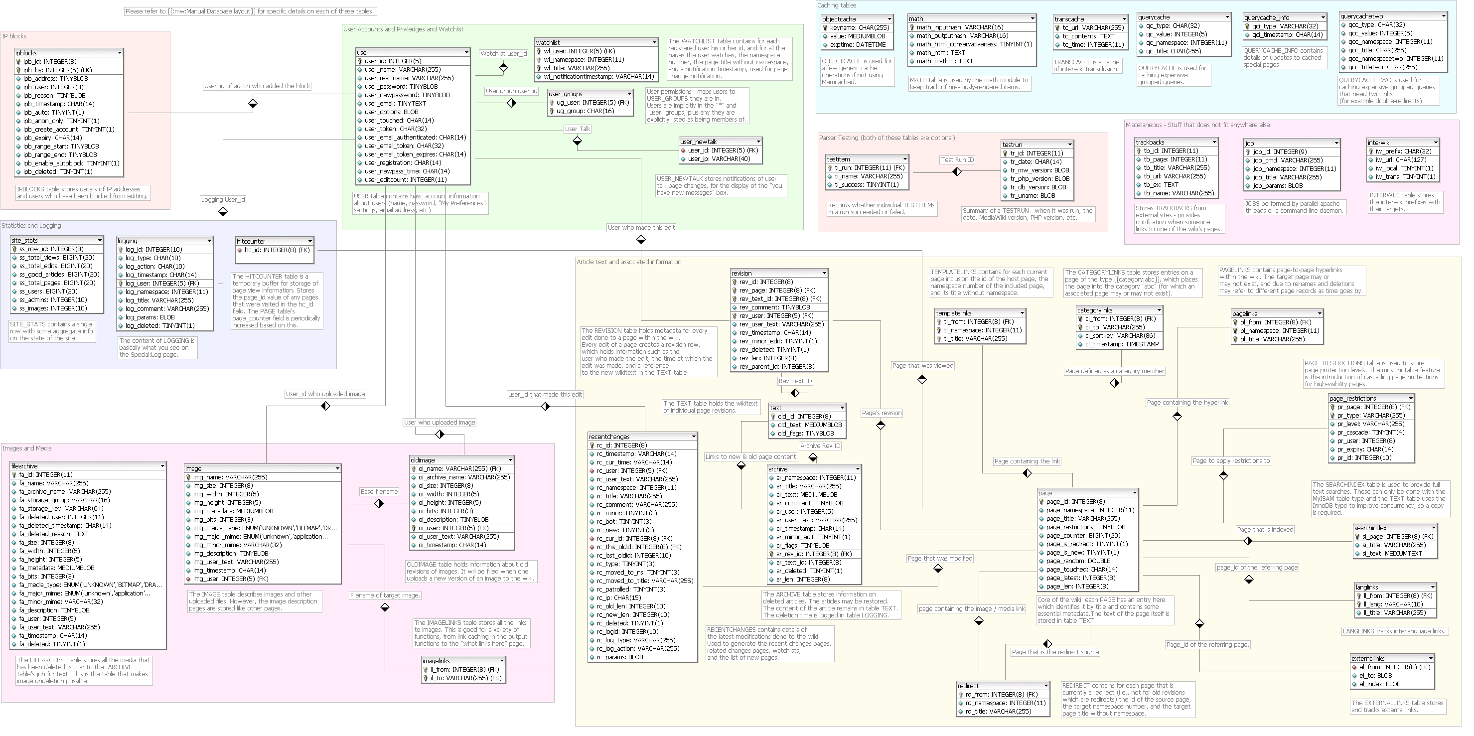 Database schema diagram for MediaWiki 1.10